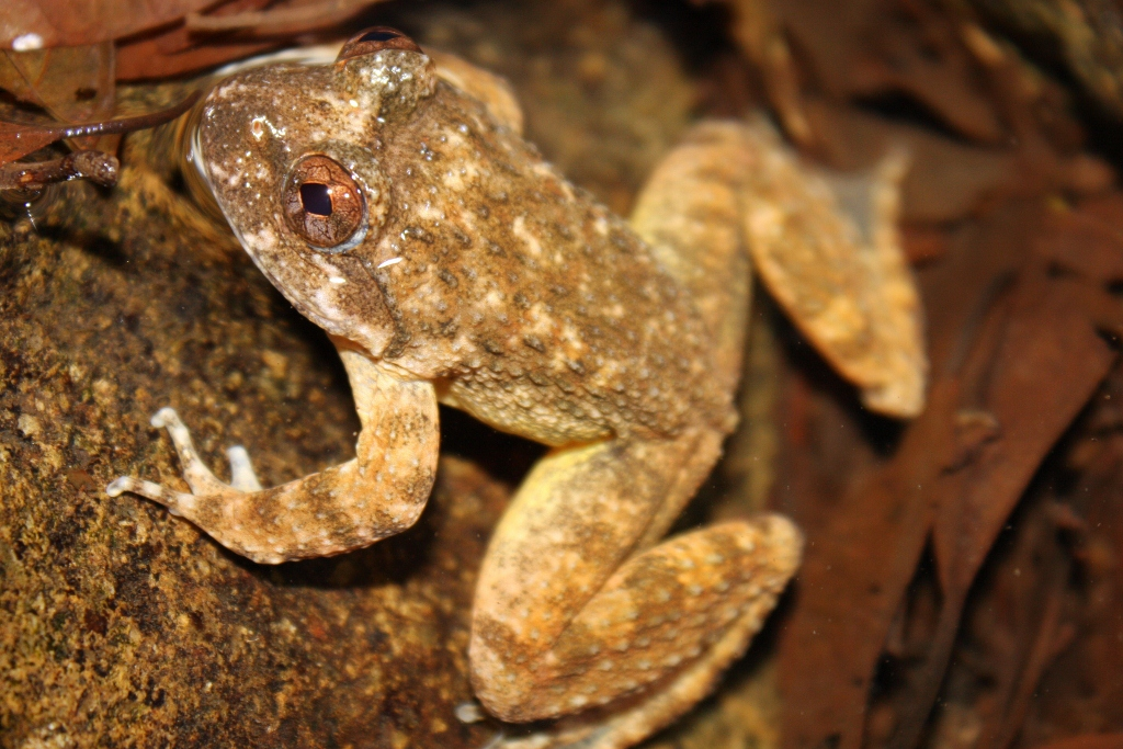 Taken in Tai Po Kau.